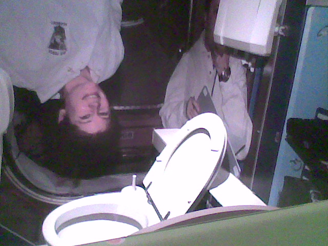 Attività laboratoriali con alunni di scuole trentine svolte nel periodo 2005 - 2010 presso la sede di via Calepina del Museo tridentino di scienze naturali e immagini delle sale espositive nella sede storica e di alcune mostre temporanee